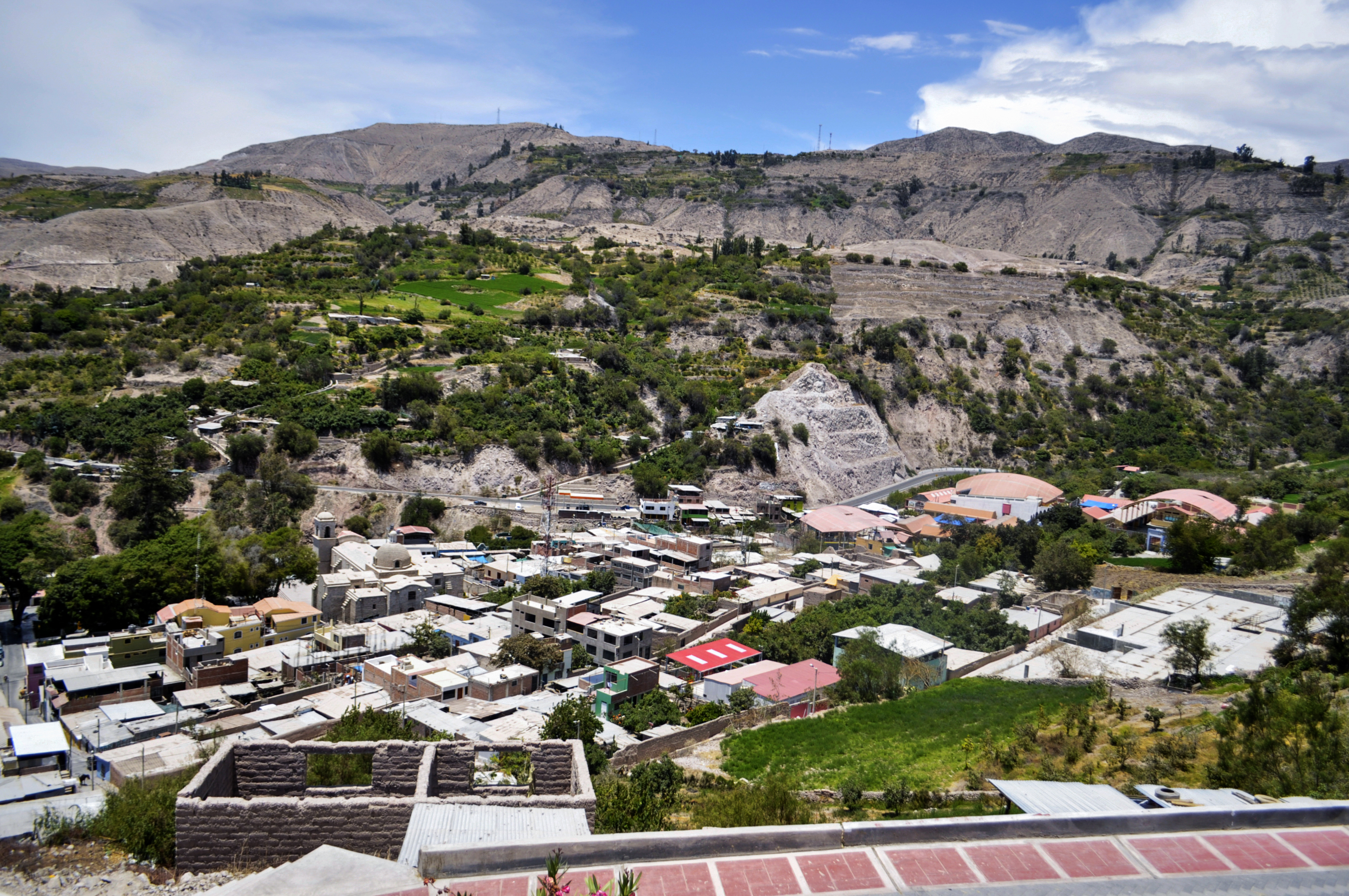 Vista panorámica de Torata